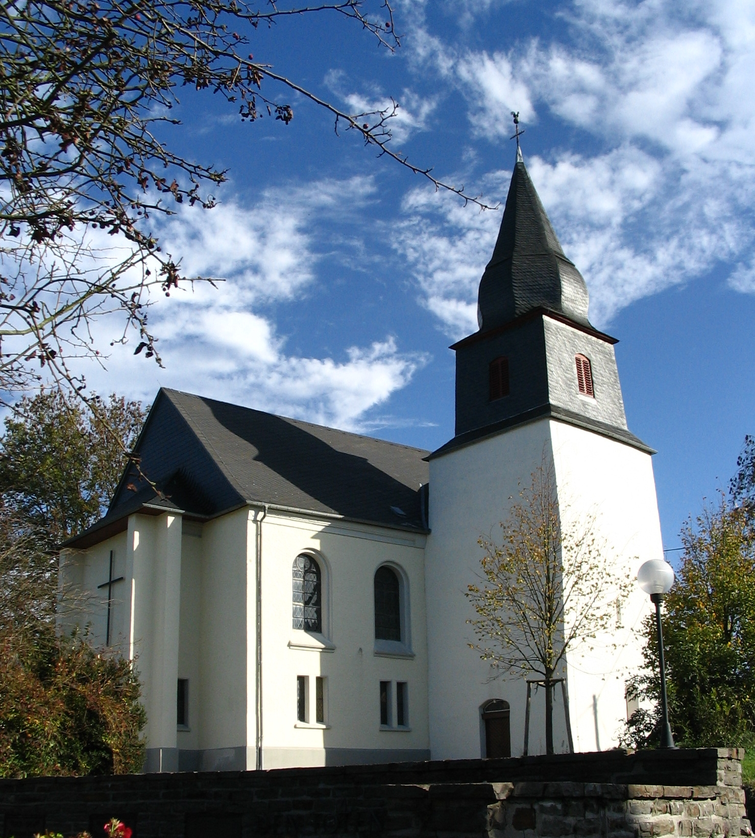 Kirche Würrich im Hunsrück